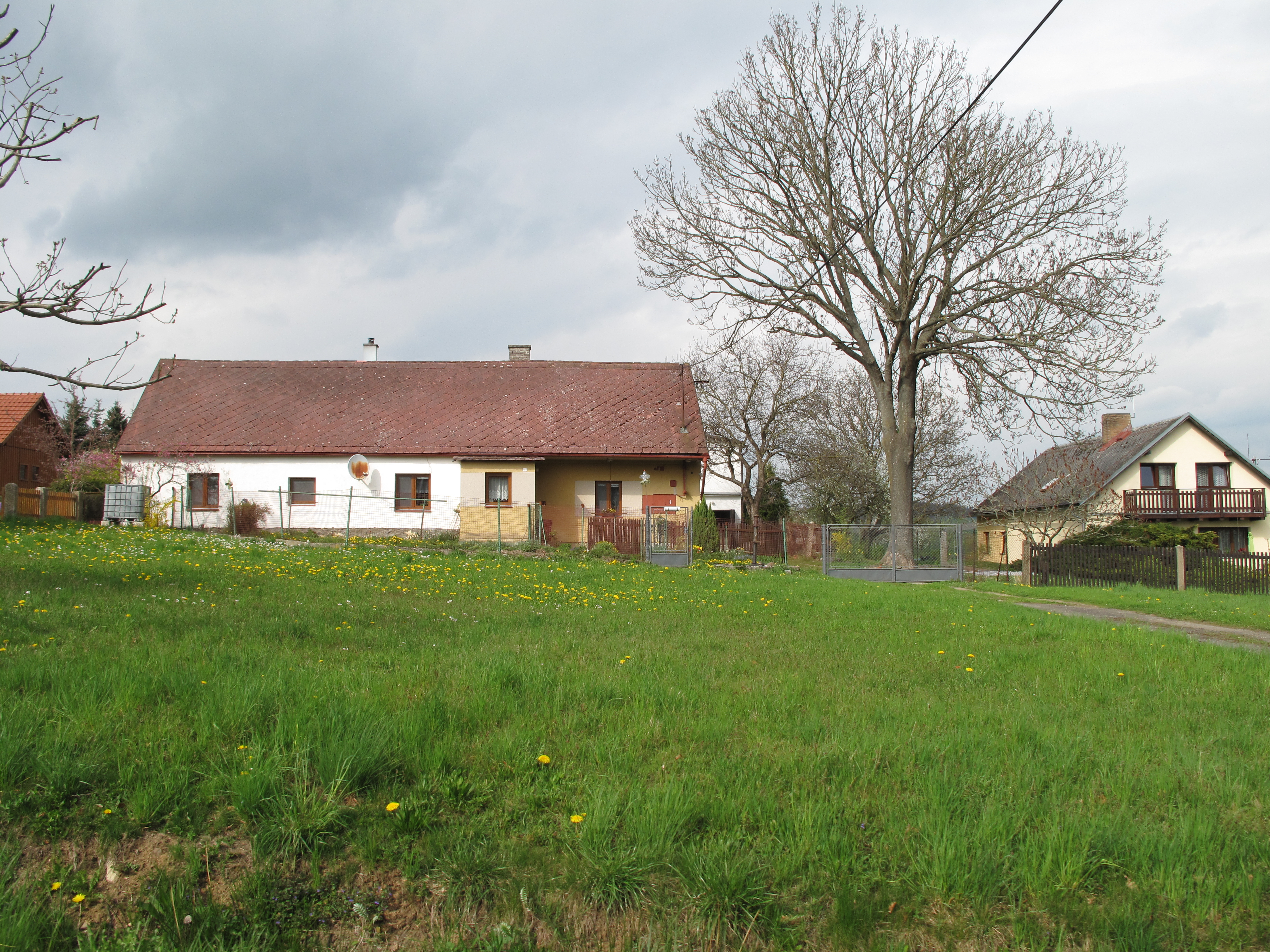 Vítaná. Okres Klatovy, Česká republika.